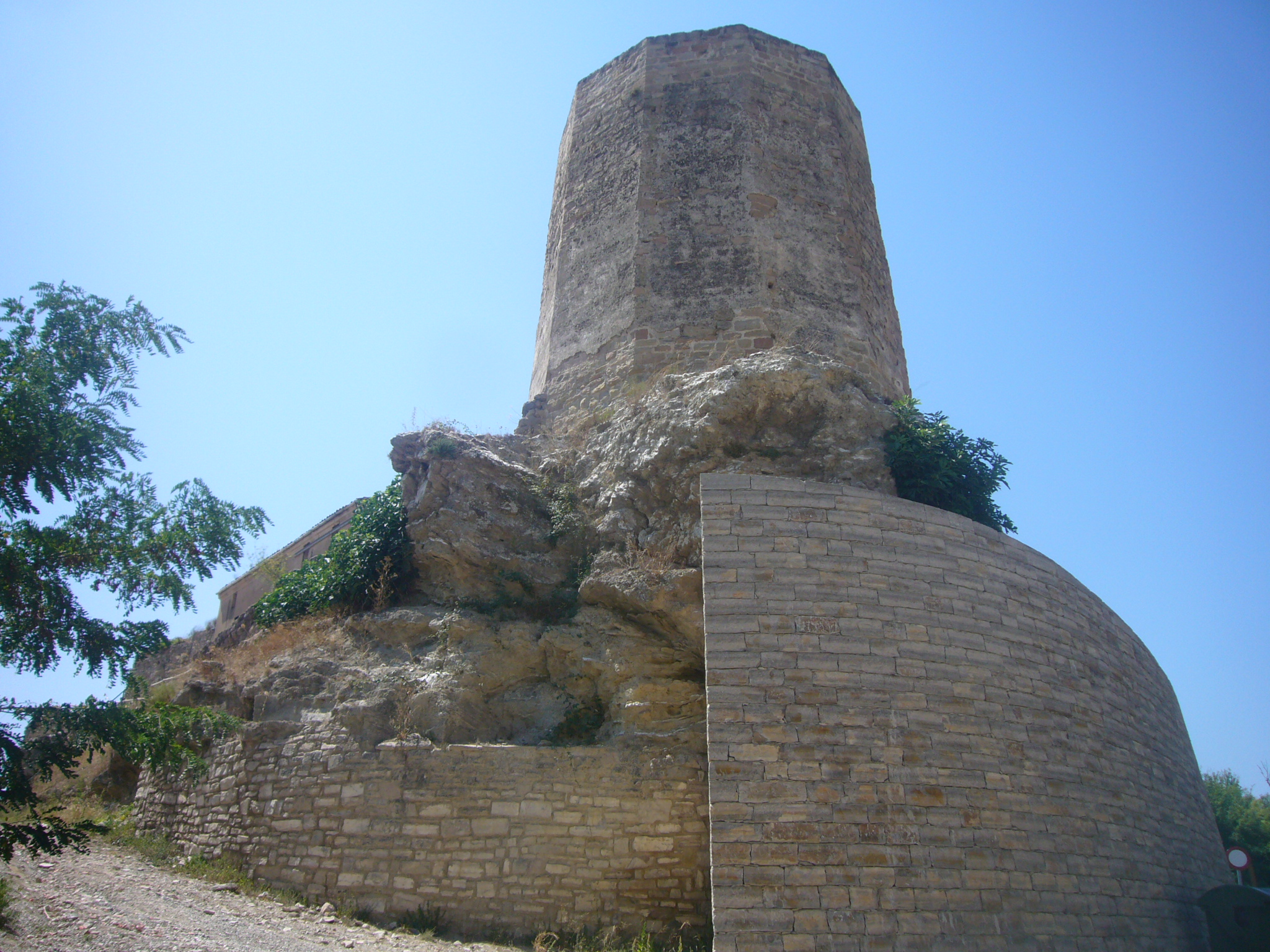 Torre albarrana del Castell d'Òdena